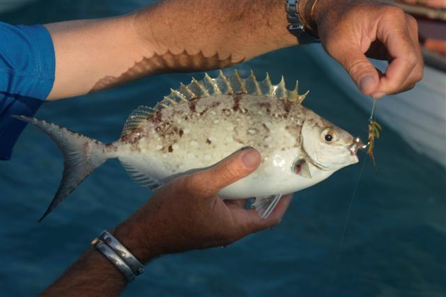 Siganus sutor, St. Brandon, Mauritius, 2013. 240 mm de longitud.